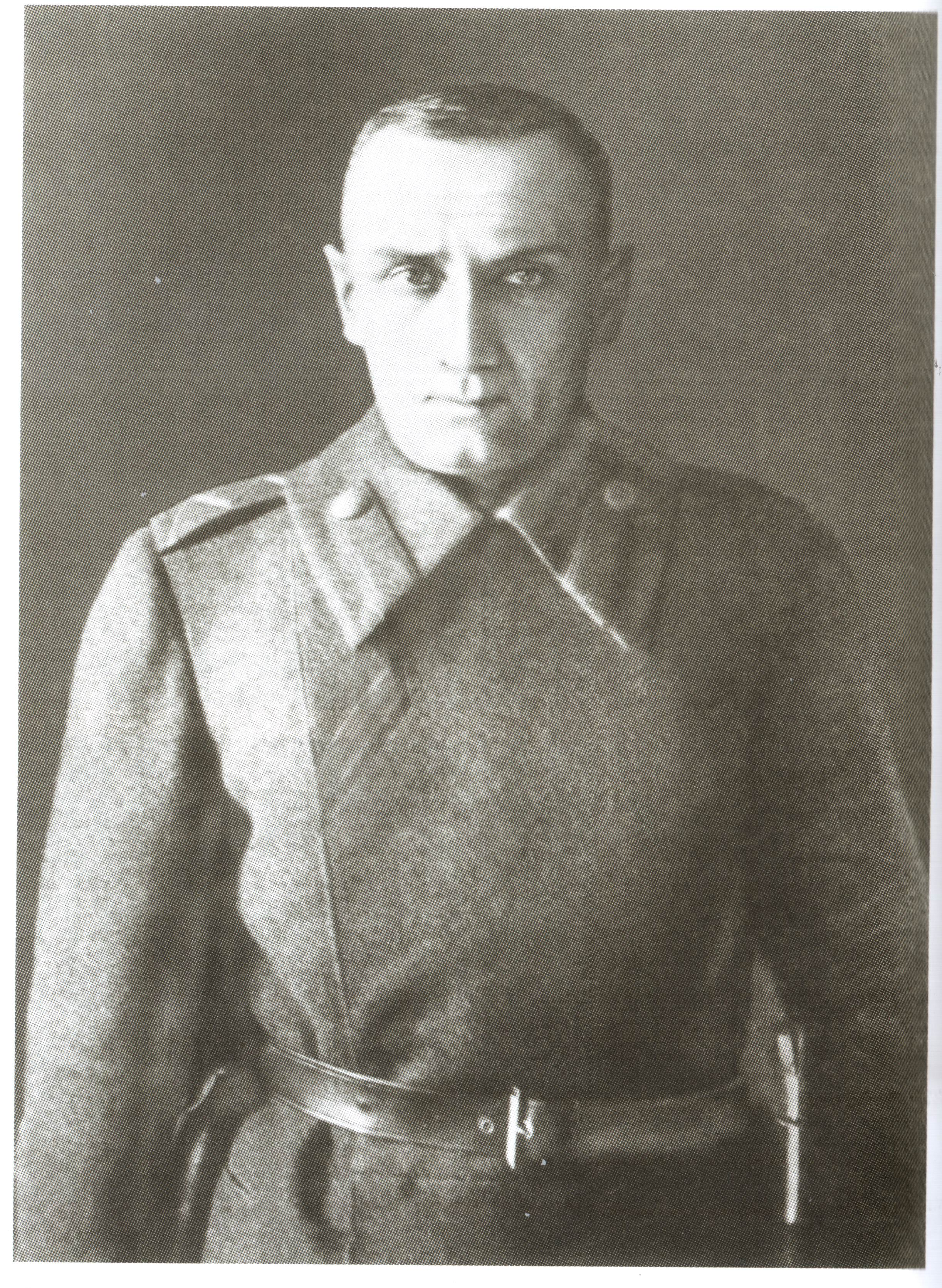 Последняя фотография А.В. Колчака